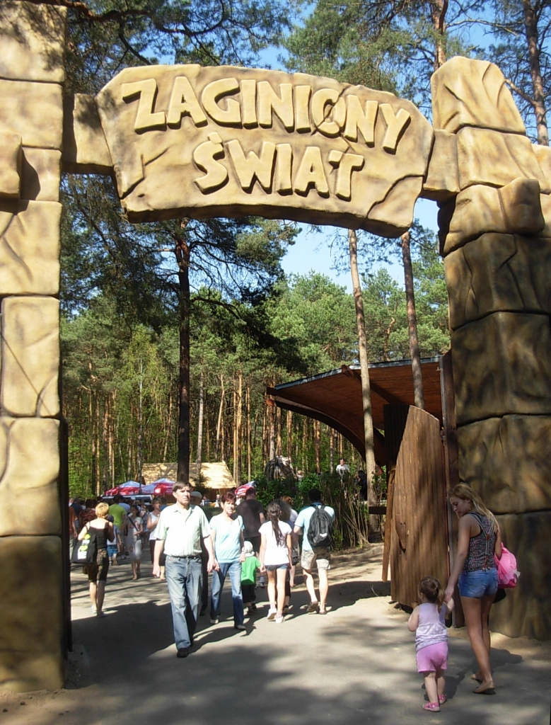 Zaginiony świat (park jurajski) w Leśnym Parku Kultury i Wypoczynku w Bydgoszczy